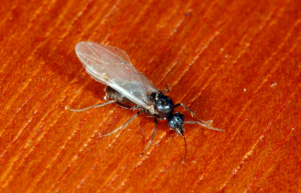 Lasius niger - geflügeltes Männchen, Frankfurt am Main, Hessen, Deutschland